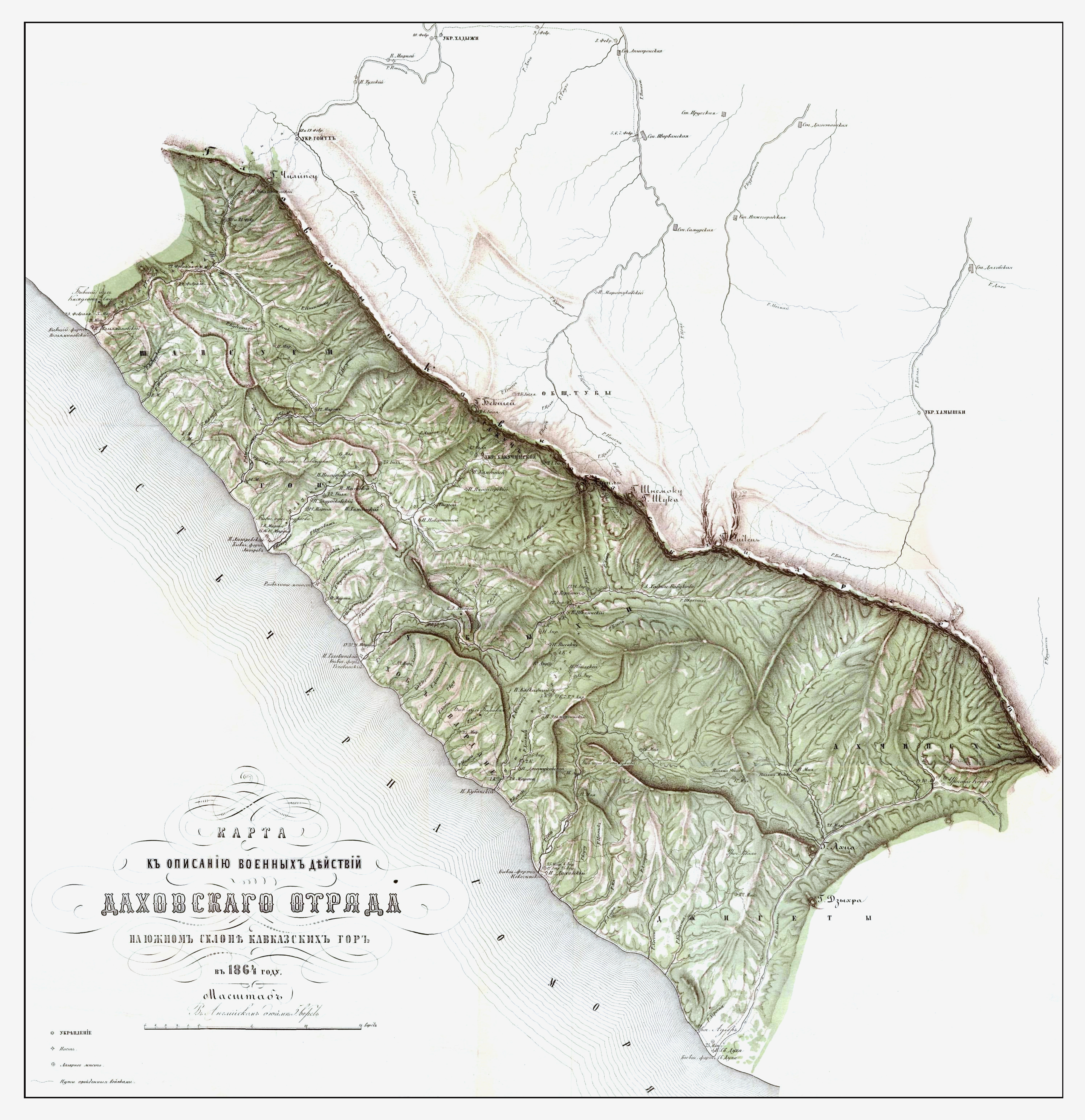 Карта действий Даховского военного отряда на Черноморском побережье Кавказа. Составлена в 1864 году